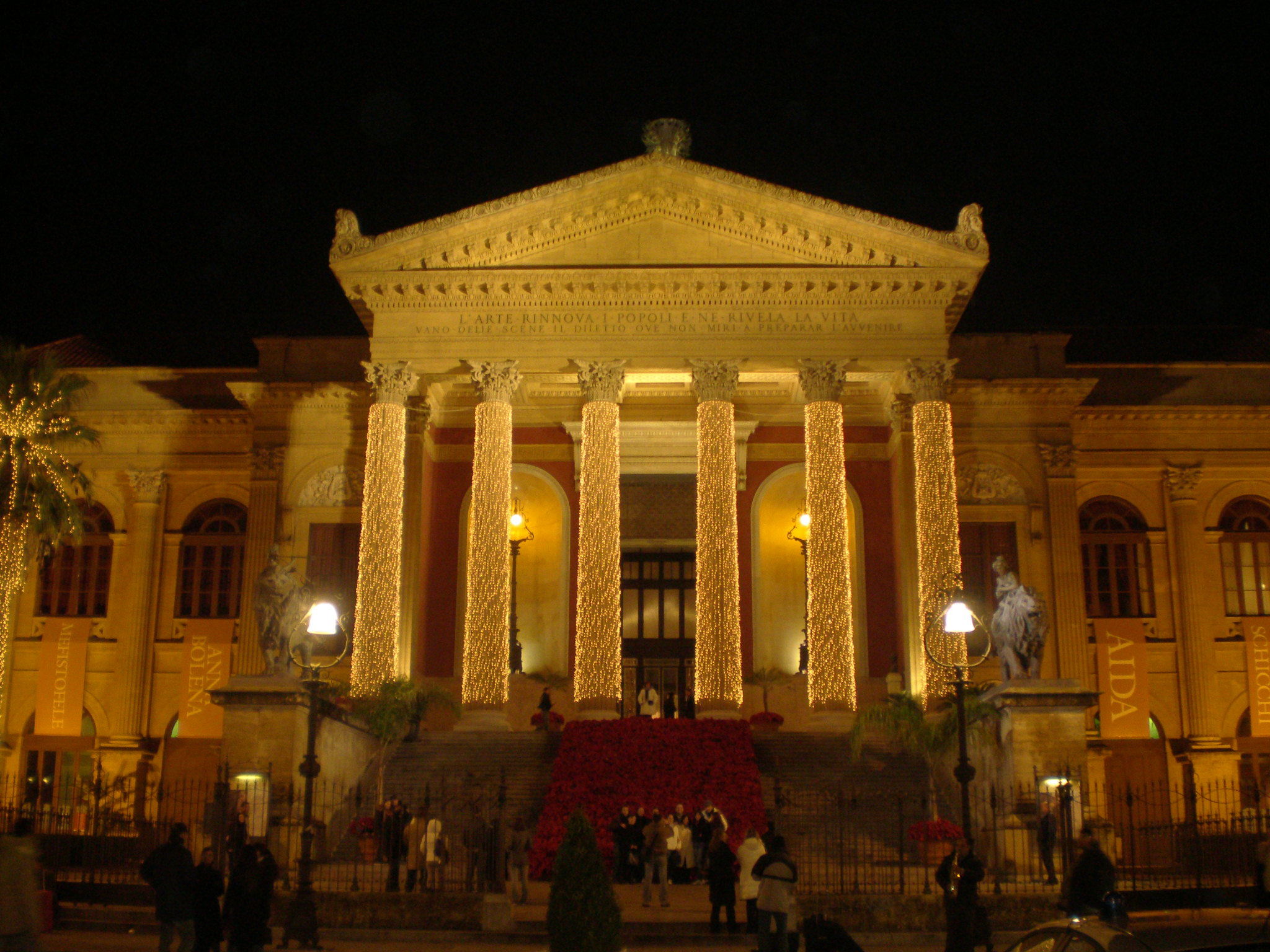 sono l'autore rilascio tutti i diritti